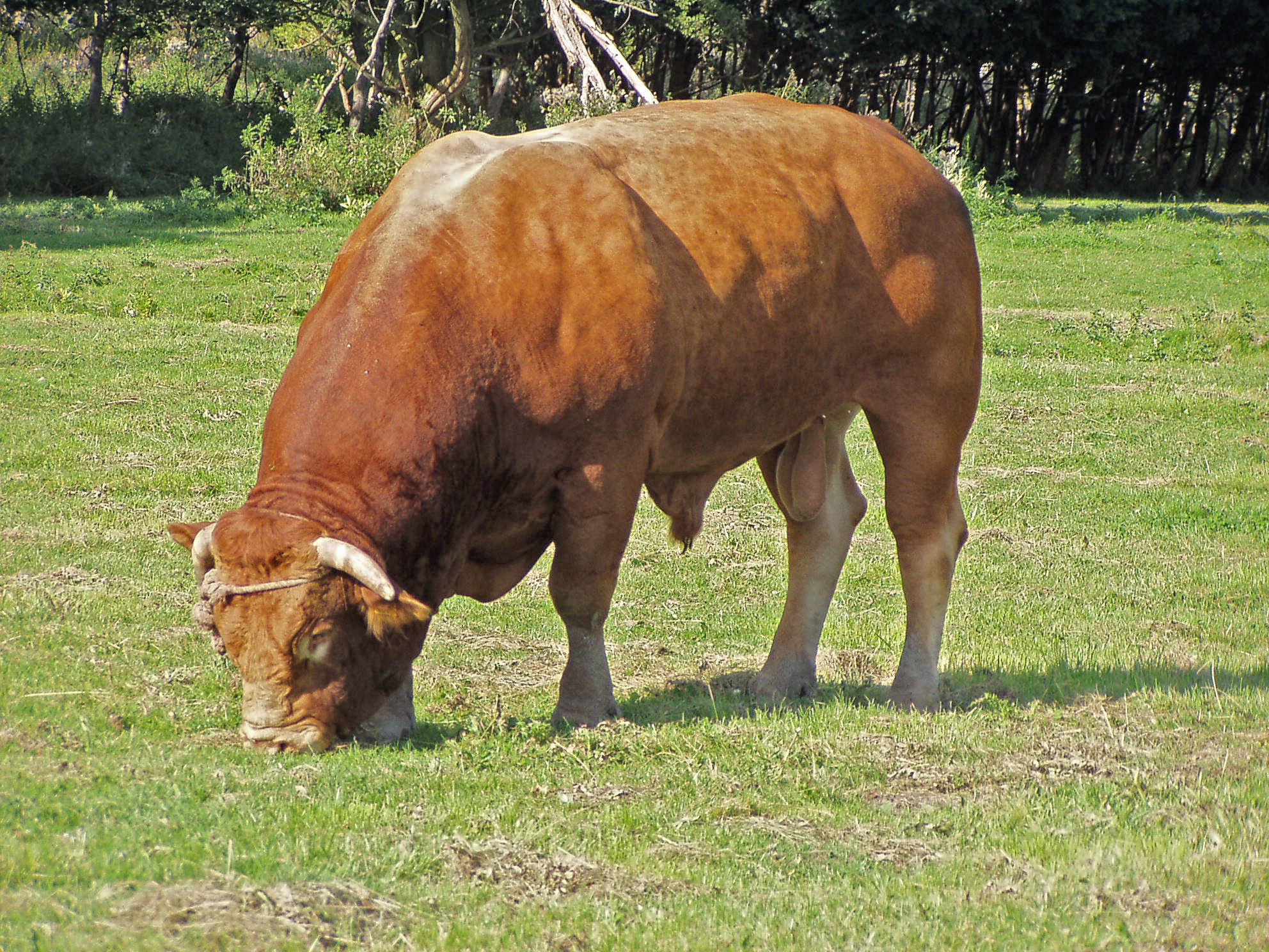 Bull, Oostvaardersplassen, The Netherlands